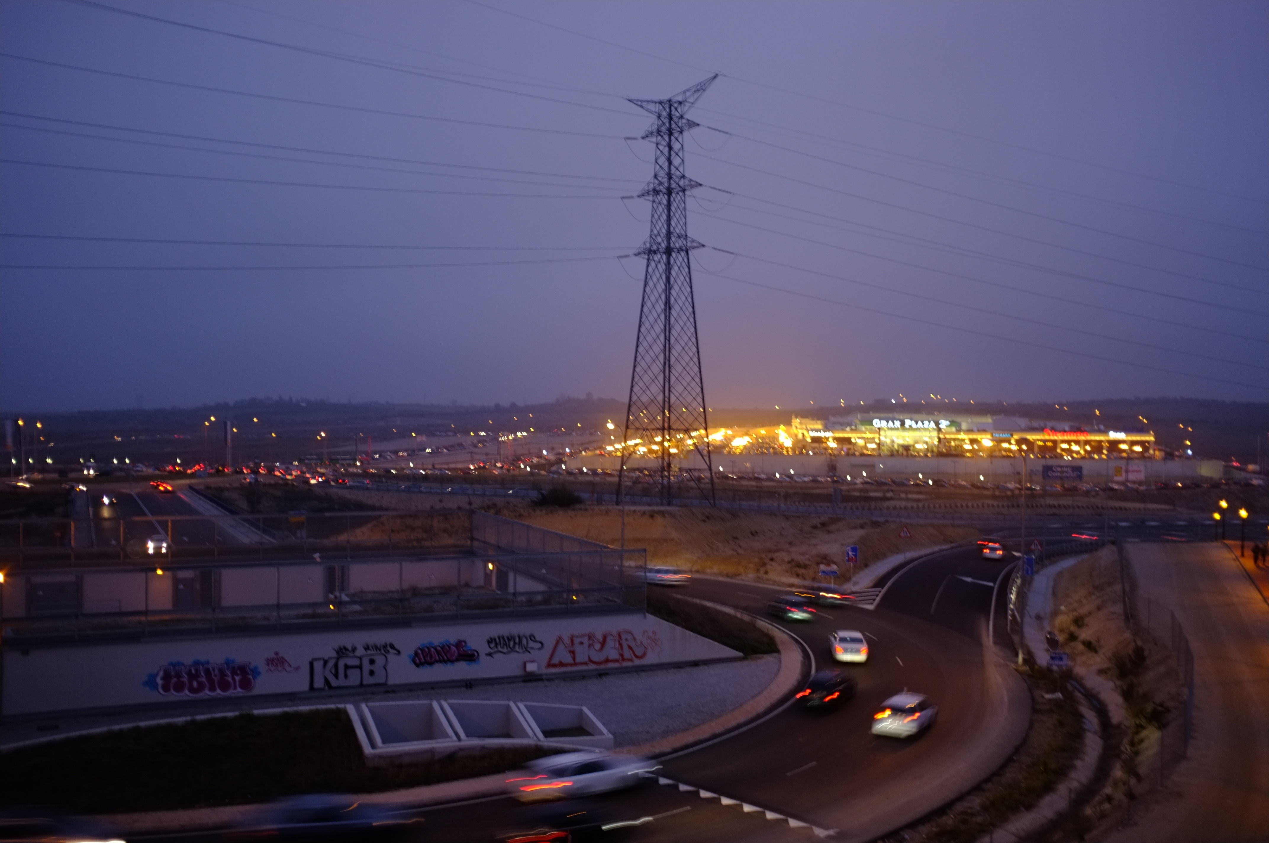 Torreta